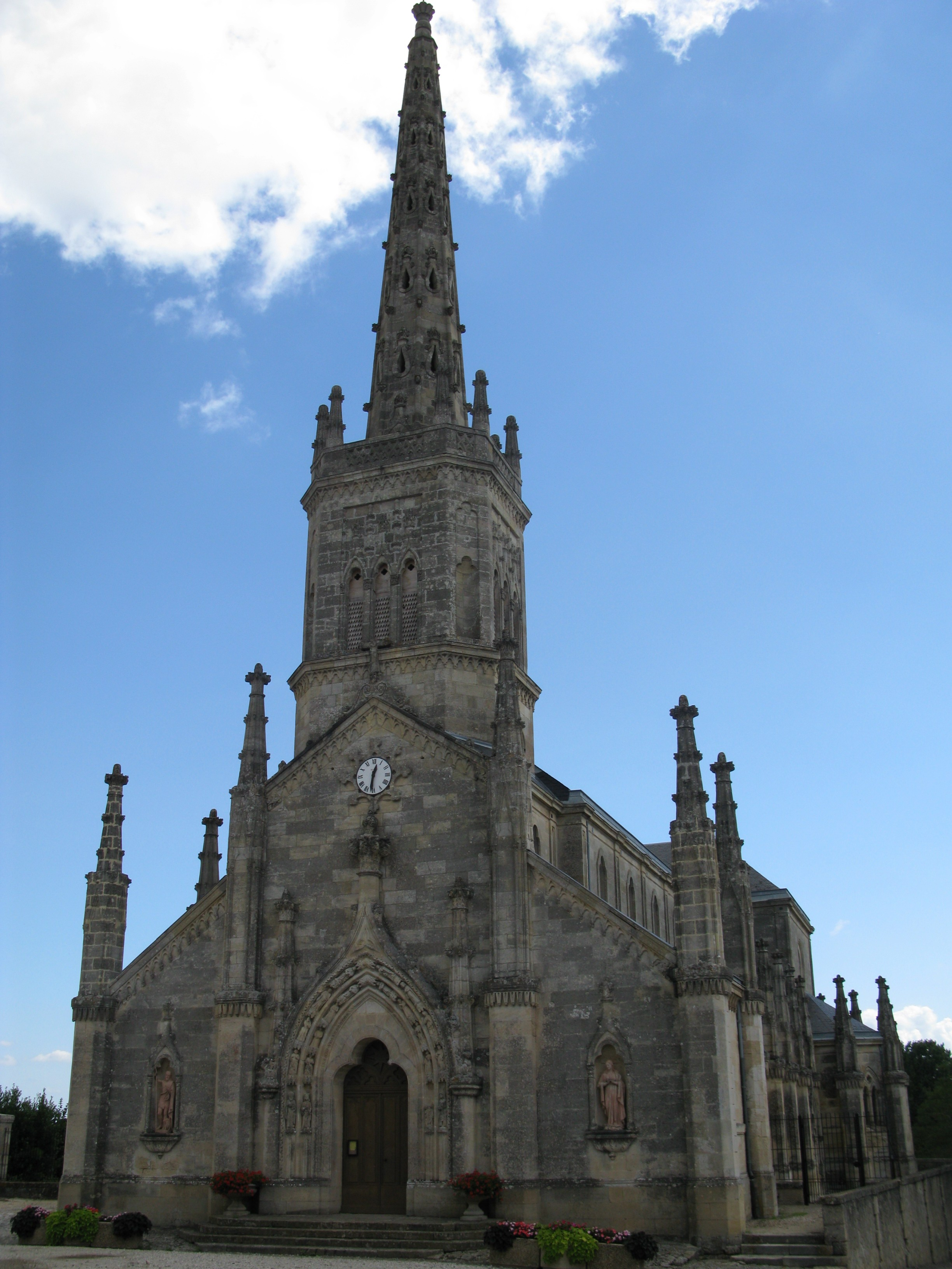 L'église de Saint-Julien-Beychevelle